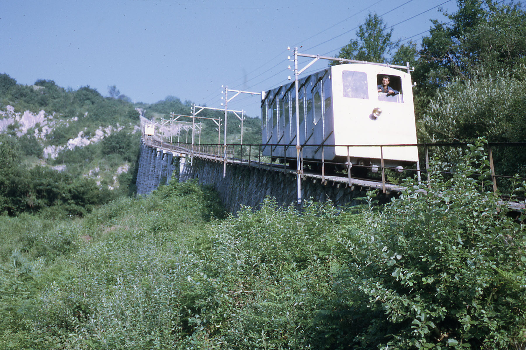 Funiculaire du Pic du Jer en 1968